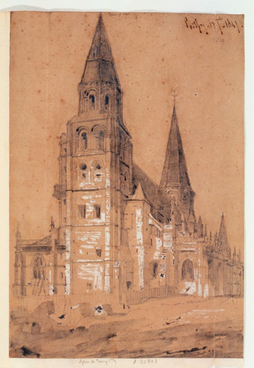 Poissy. (Vue de l'église), dessin de Mansson, Théodore-Henri (1811-1850)